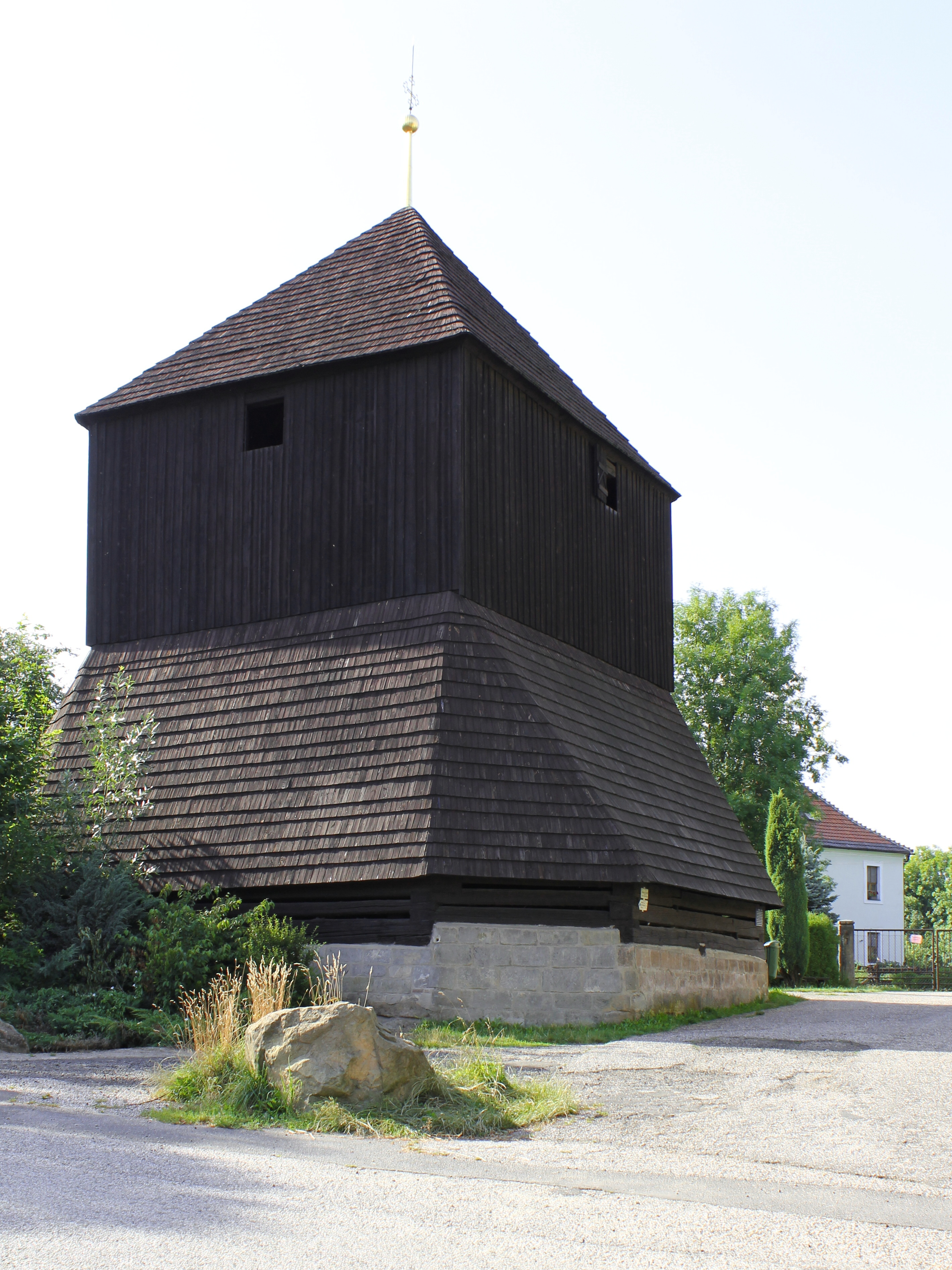 Zvonice, Rovensko pod Troskami